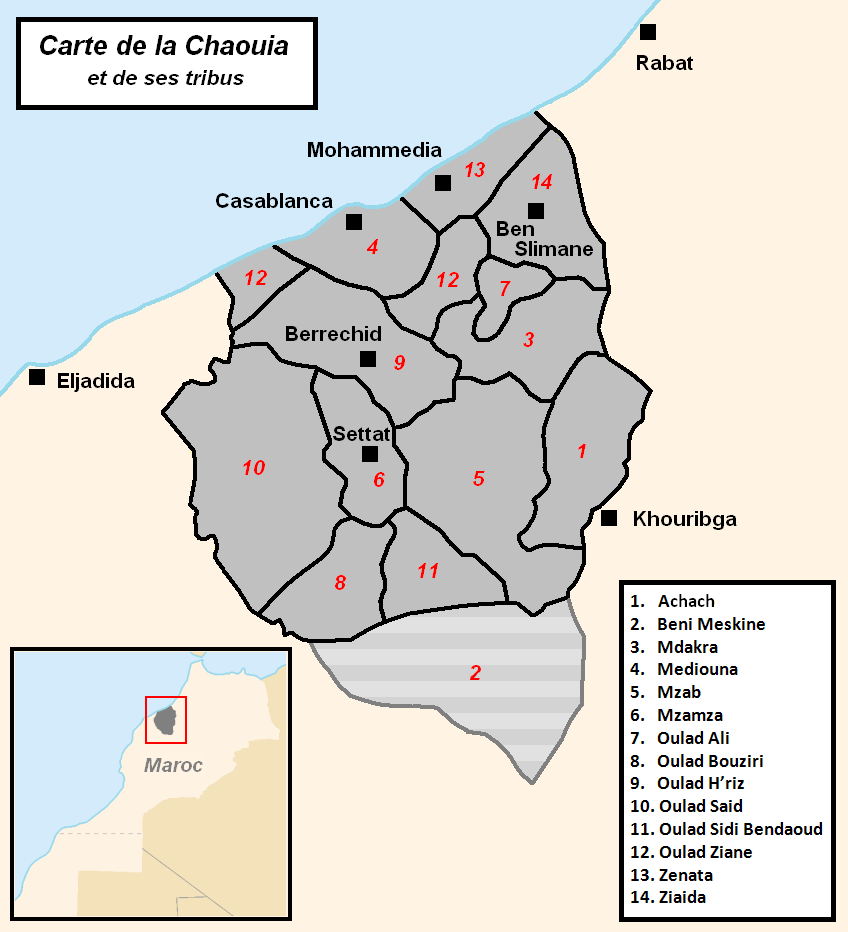 Cartes des tribus de la Chaouia (Maroc). Les Beni Meskin (hachuré), au départ tribu de la Tadla, sont considérés comme tribu de la Chaouia a partir du XIXe s.